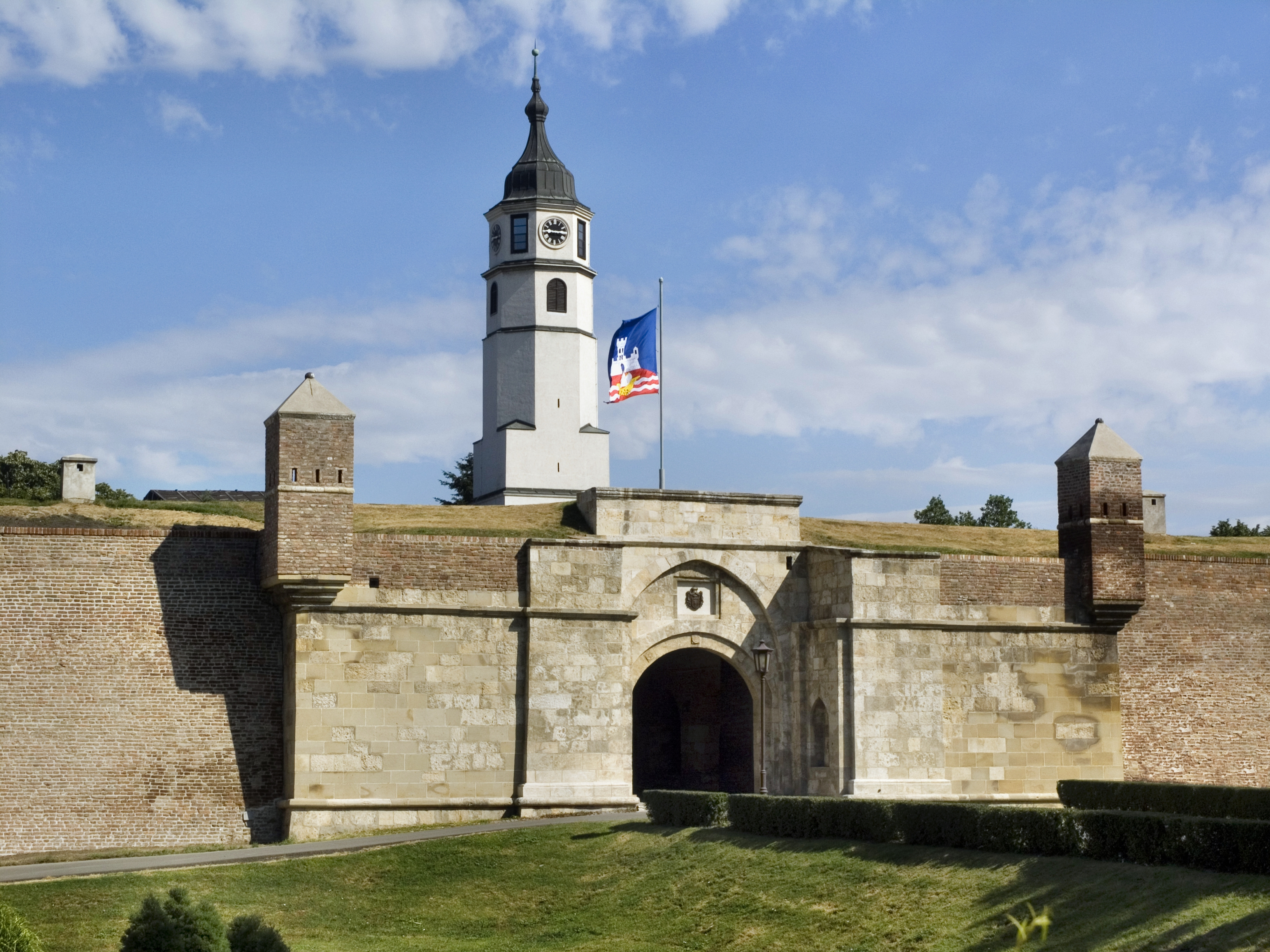 Сербия, Белград. Крепость Калемегдан